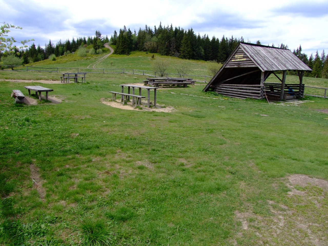 Polana Wierch Lubania i studencka baza namiotowa (przed sezonem)